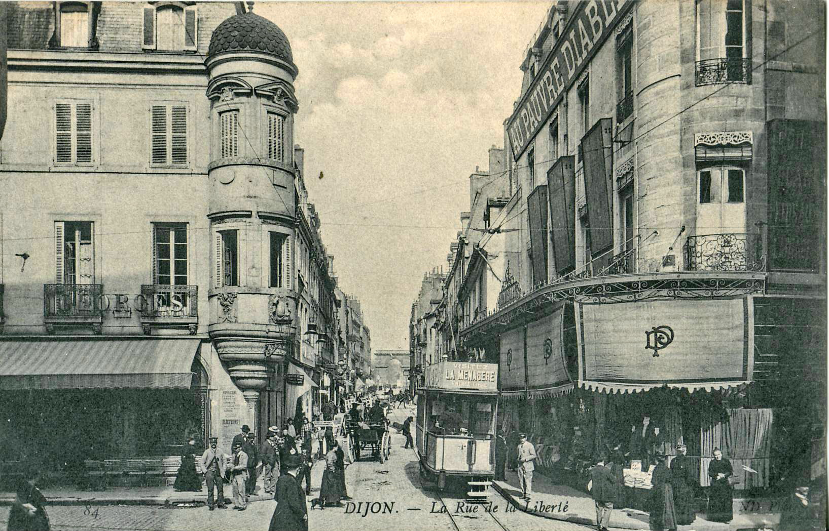 Carte postale ancienne éditée par ND, n°84 : DIJON - La Rue de la Liberté